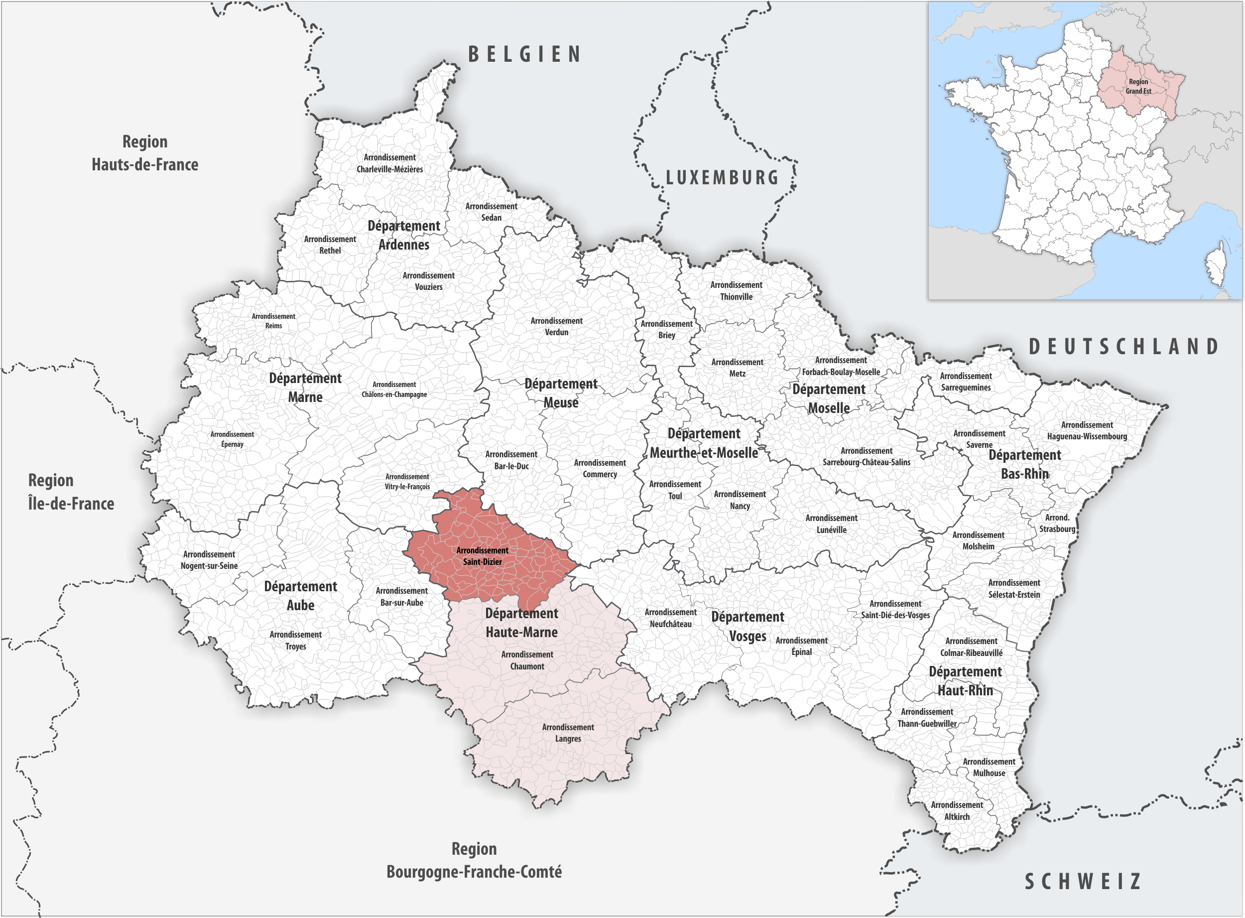 Lage des Arrondissements Saint-Dizier